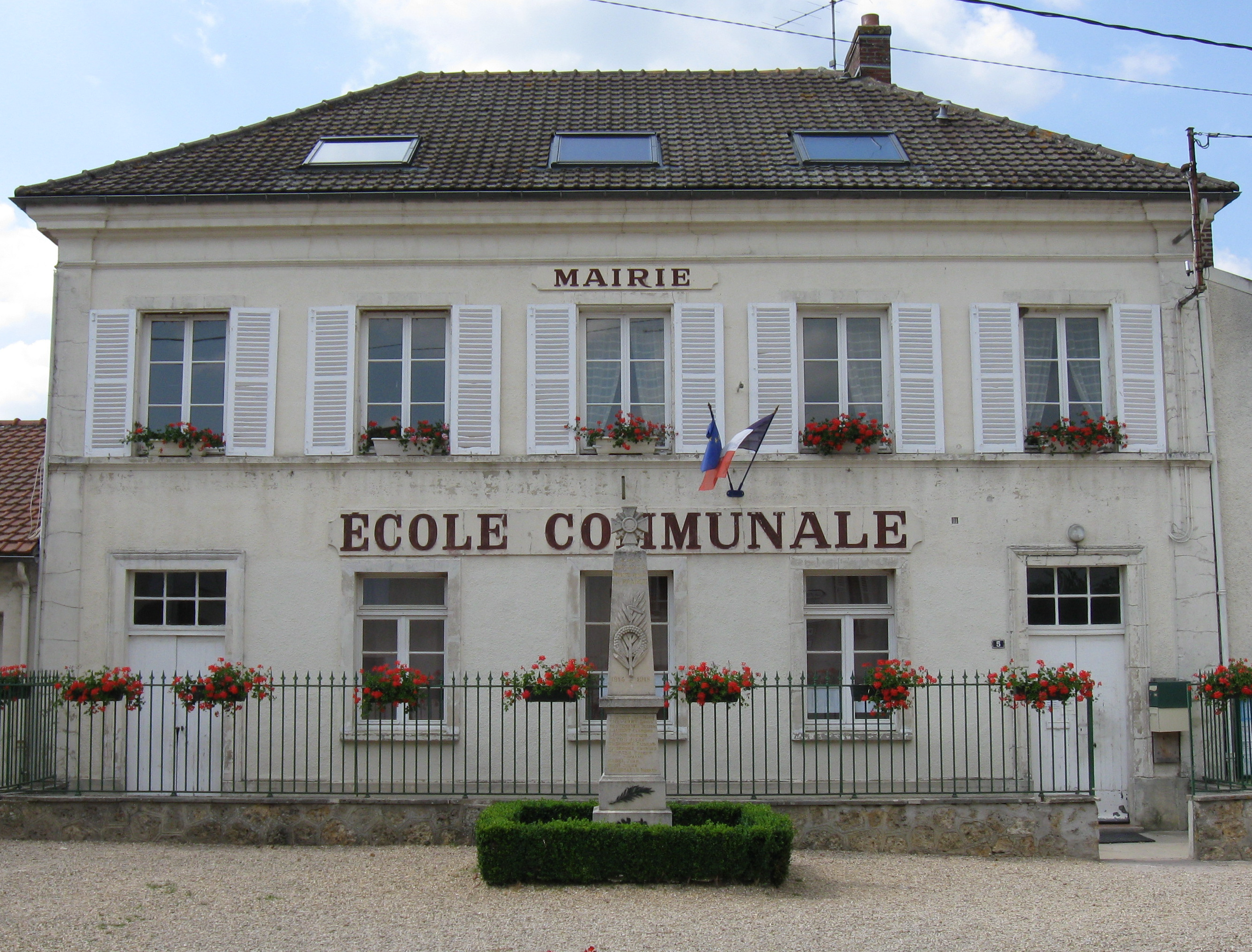 Mairie de Signy-Signets. (département de la Seine-et-Marne, région Île-de-France).